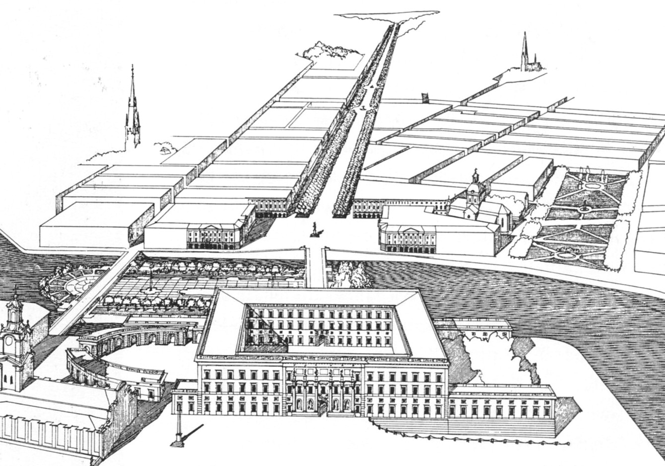 Förslag till breddning av Sveavägen enligt Lindhagenplanen